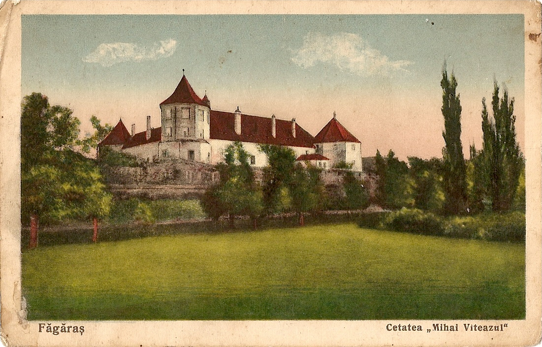 interbelic